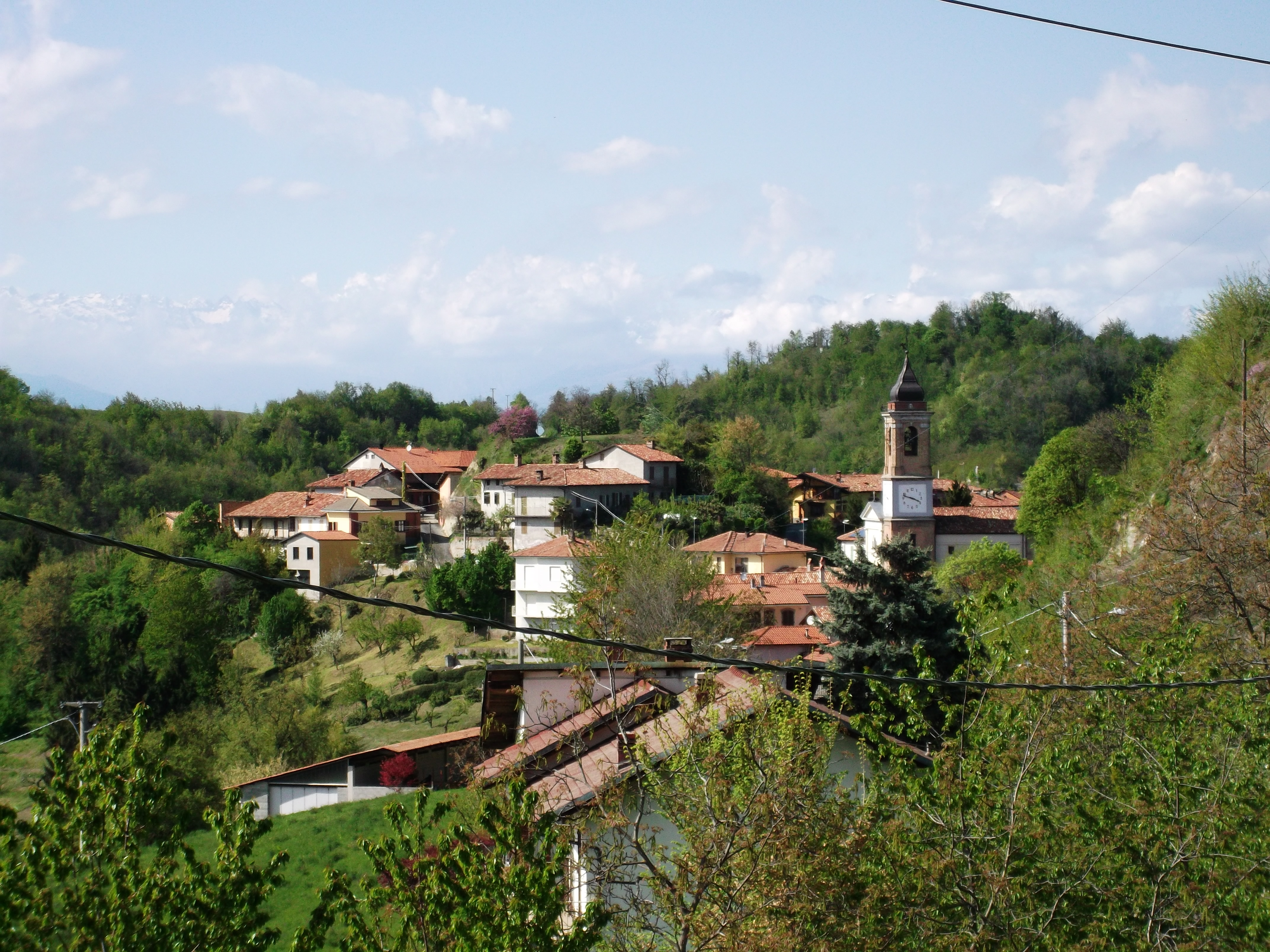 Comune di Tonengo, Asti (Italy)